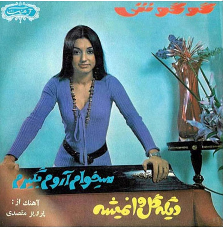 دیگه گل وا نمیشه - میخام آروم بگیرم